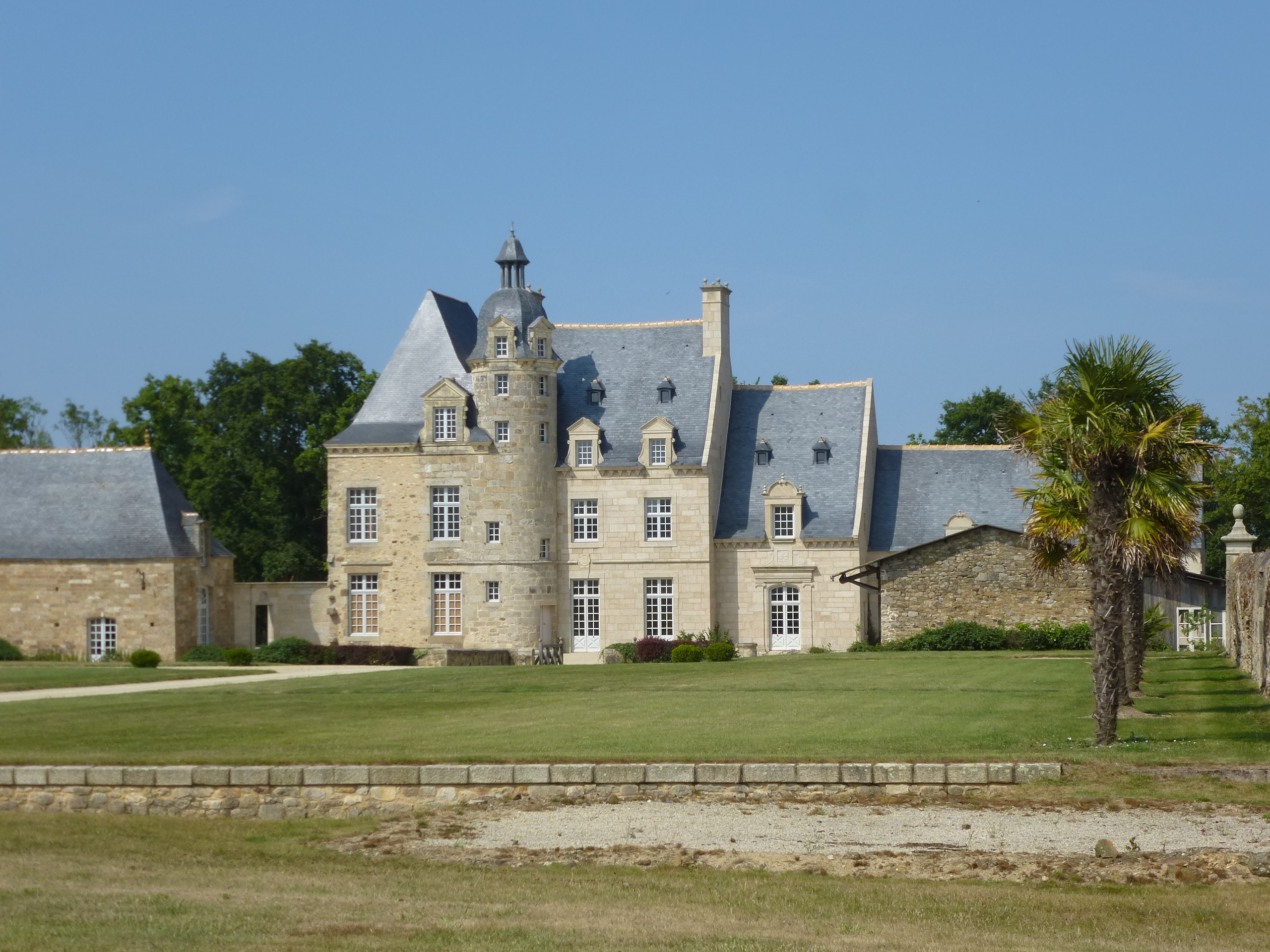 Manoir de la Coudraie, commune de Ploubalay. (Côtes-d'Armor, région Bretagne).